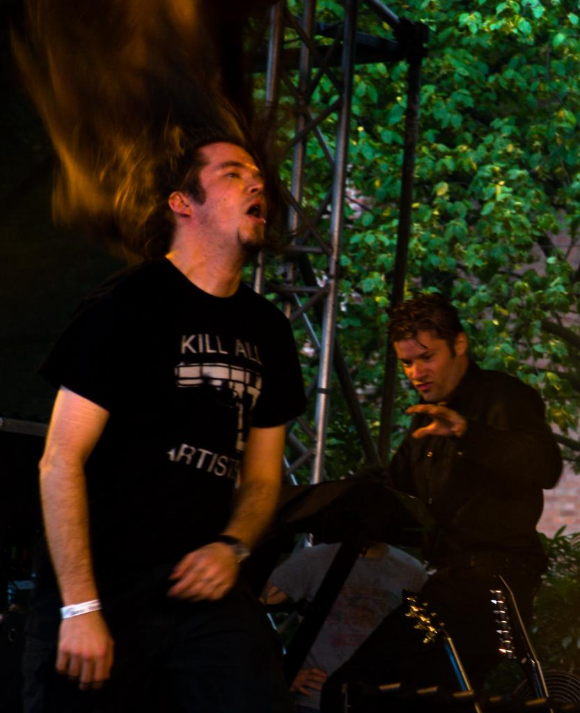 Samsas Traum @ Amphi Festival 2007